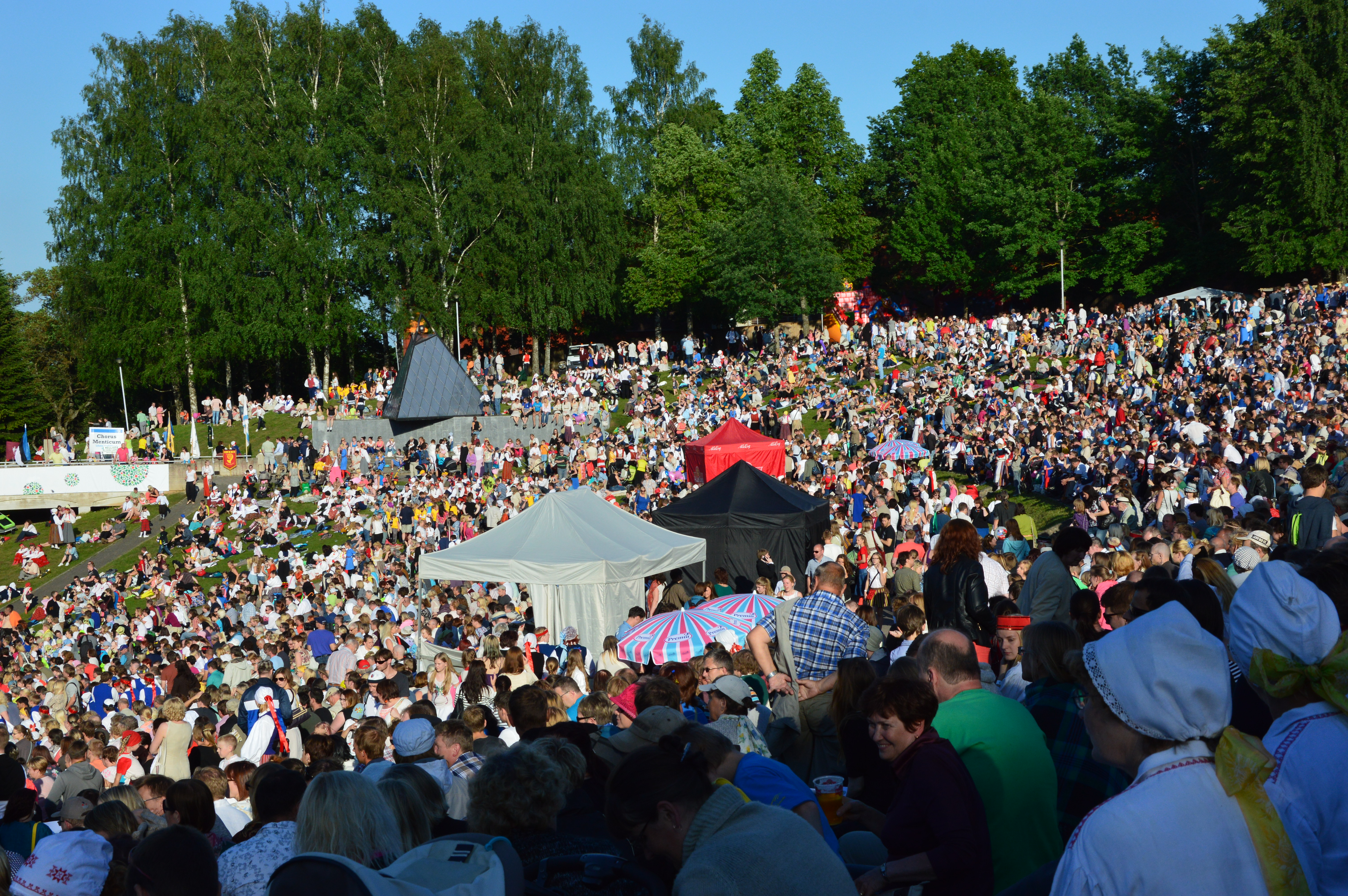 Tartu laulupidu 2014